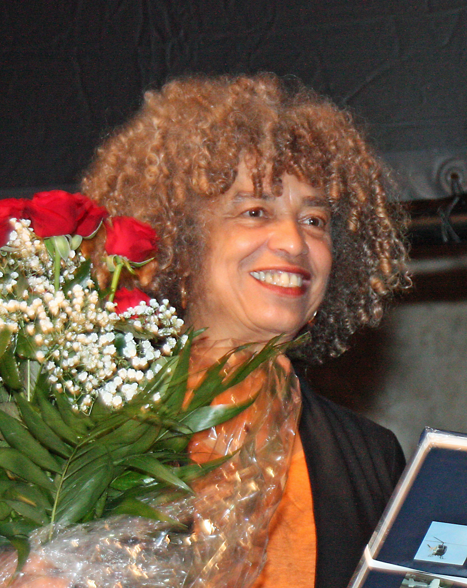 Angela Davis in Leipzig